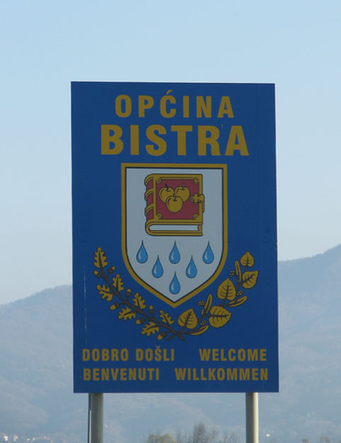 Ploča na ulazu u Općinu Bistra, Zagrebačka županija, s grbom Općine